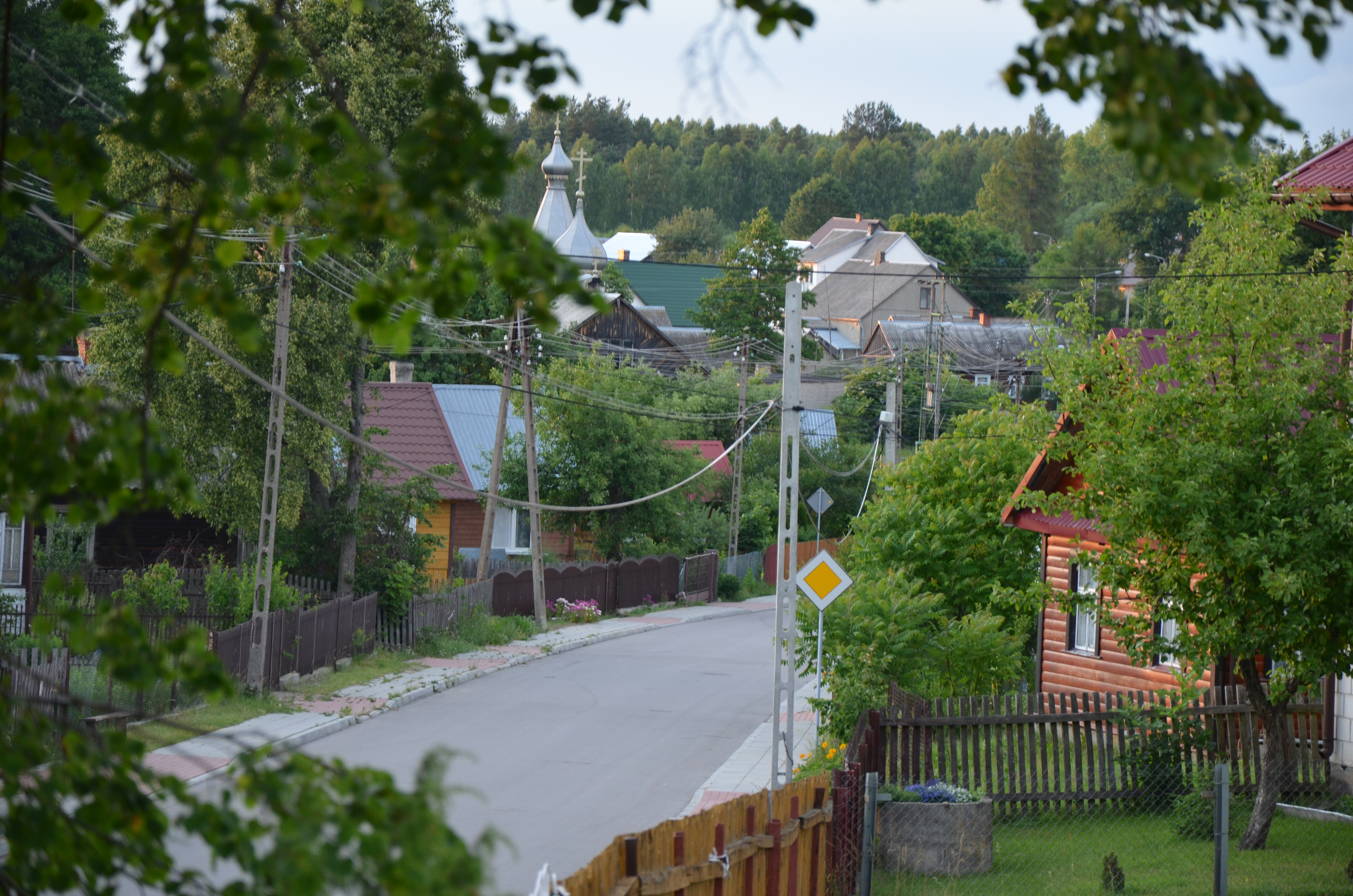 Dobrowoda ul. Główna